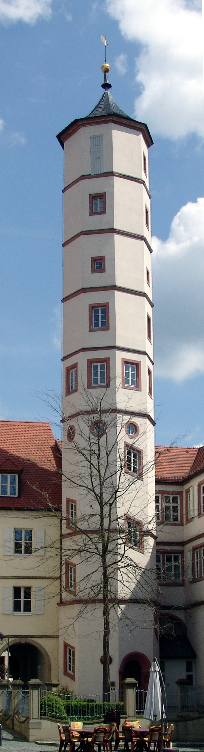 Schrotturm